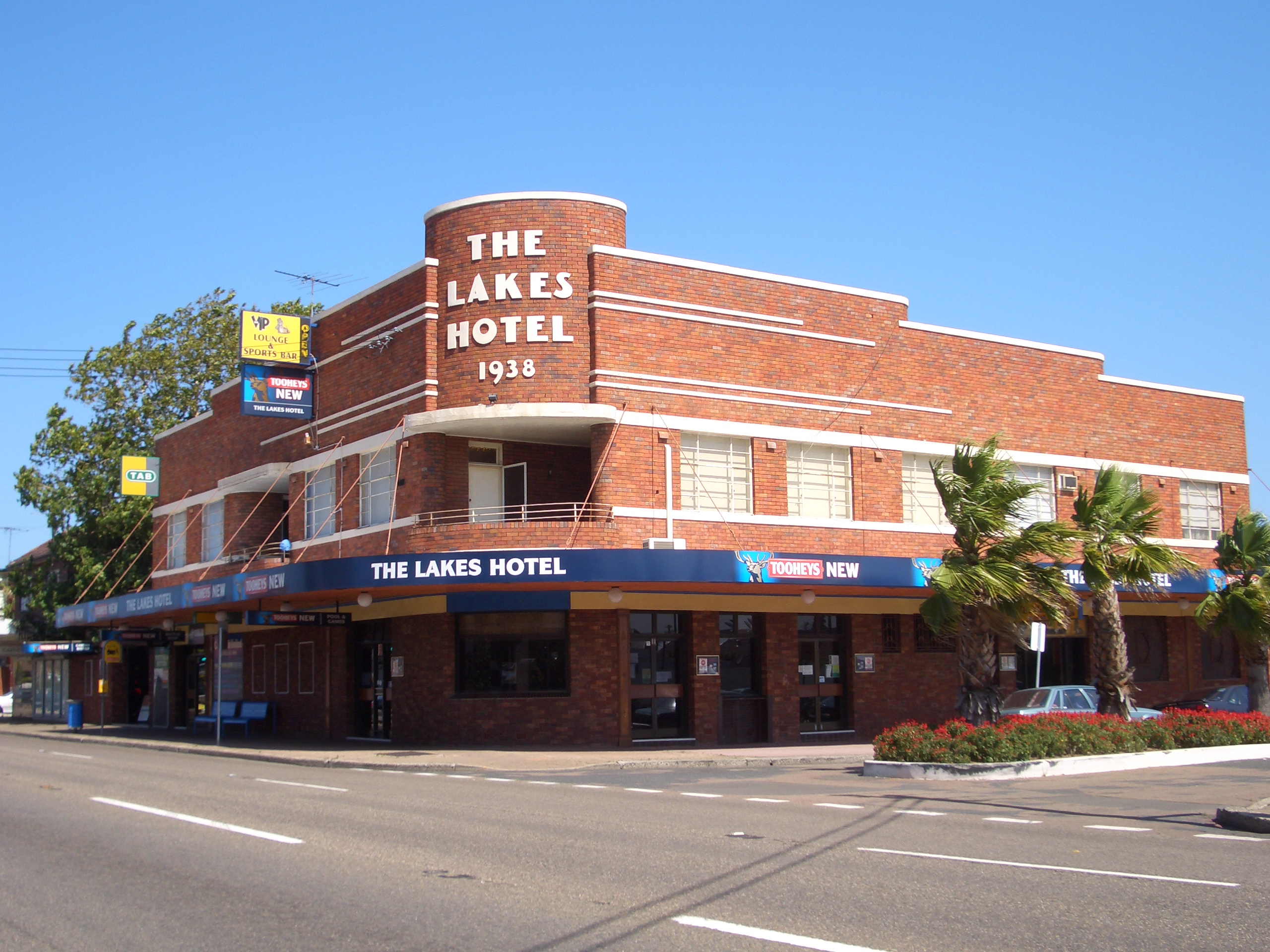 Rosebery